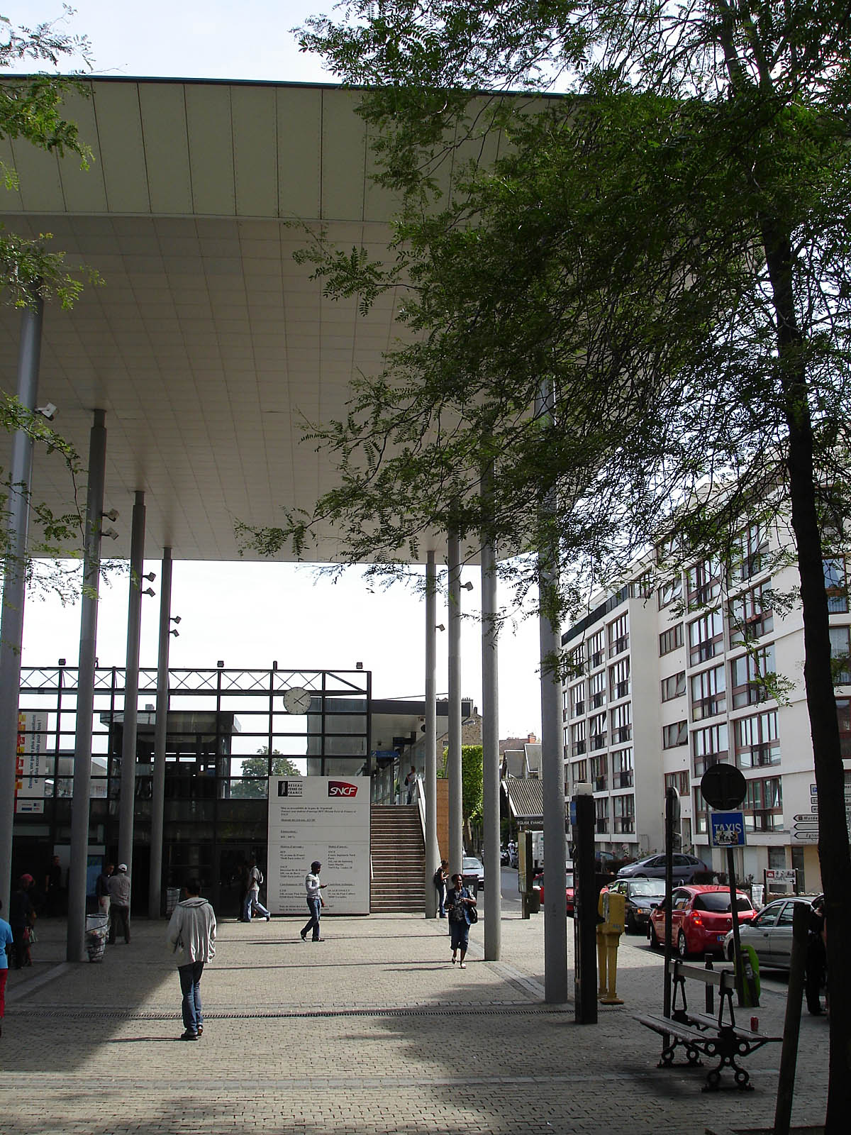 La gare d'Argenteuil, Val-d'Oise, France.